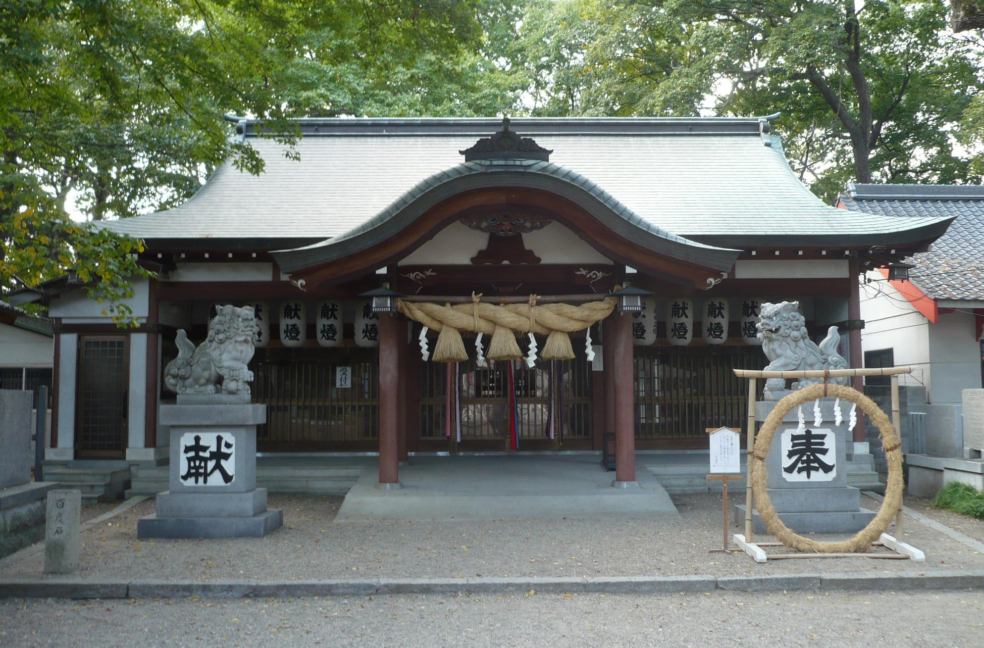 若江鏡神社（大阪府東大阪市）拝殿